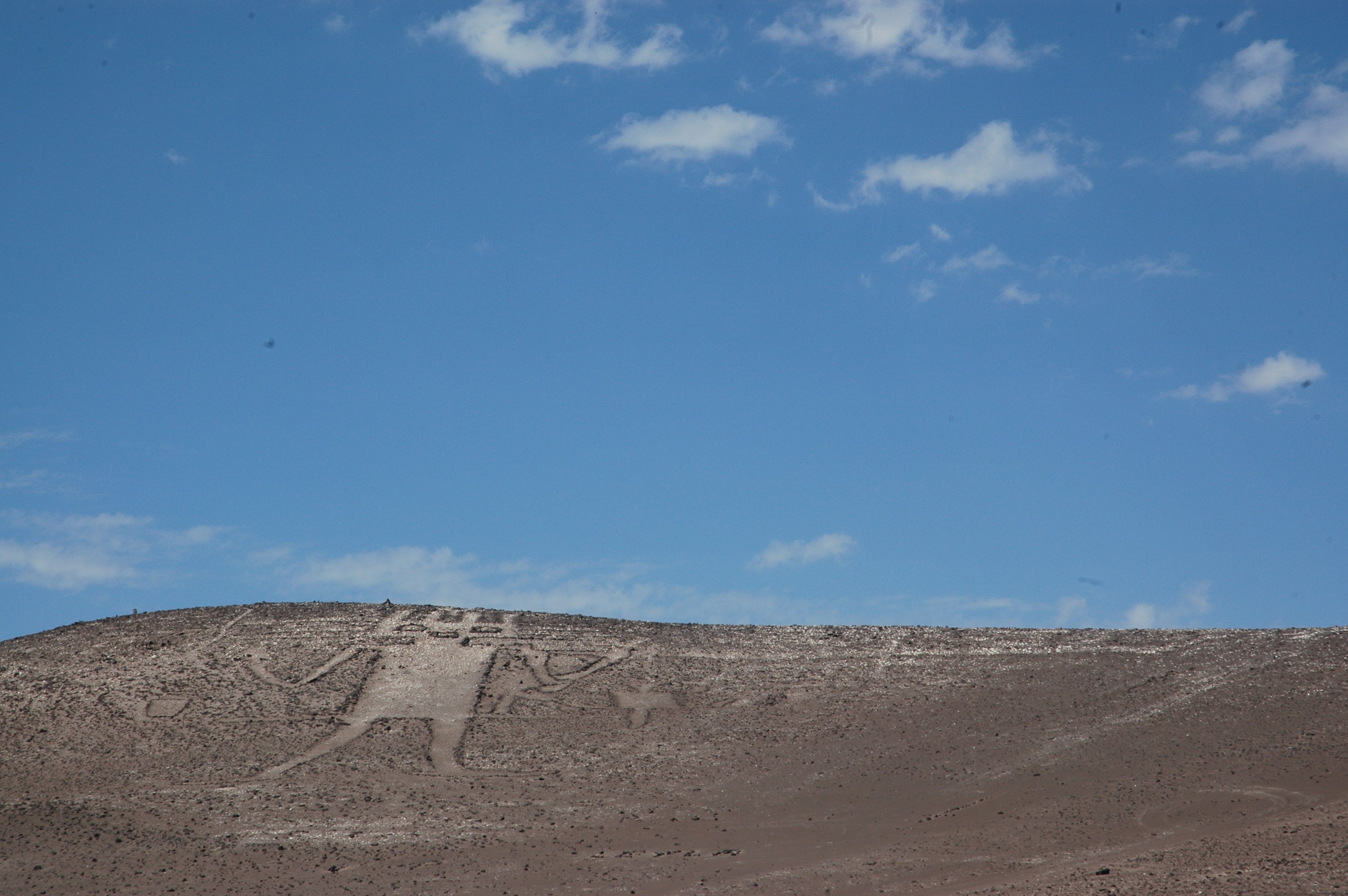 Atacama Giant, Chile